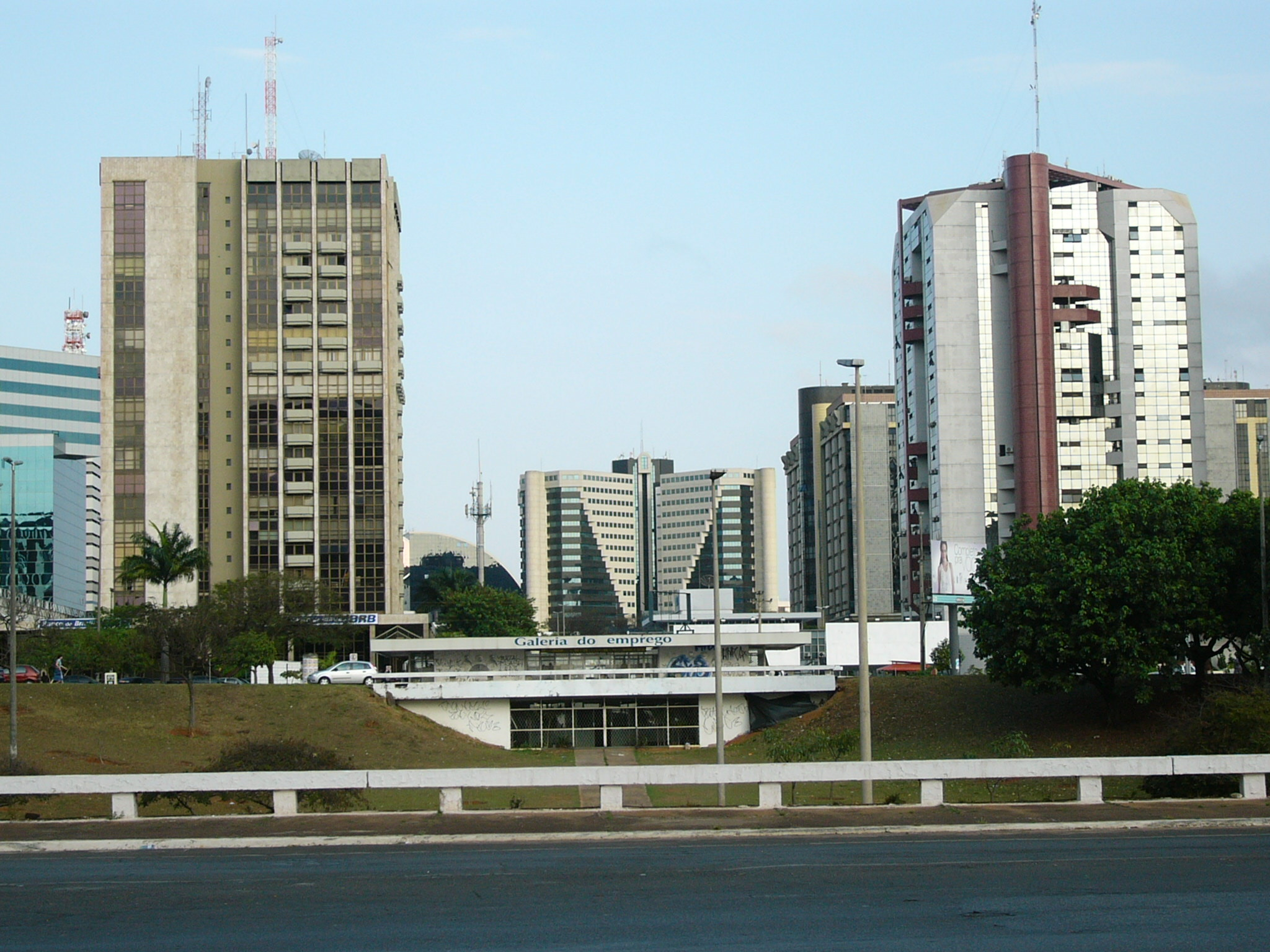 Imagem tirada por mim.